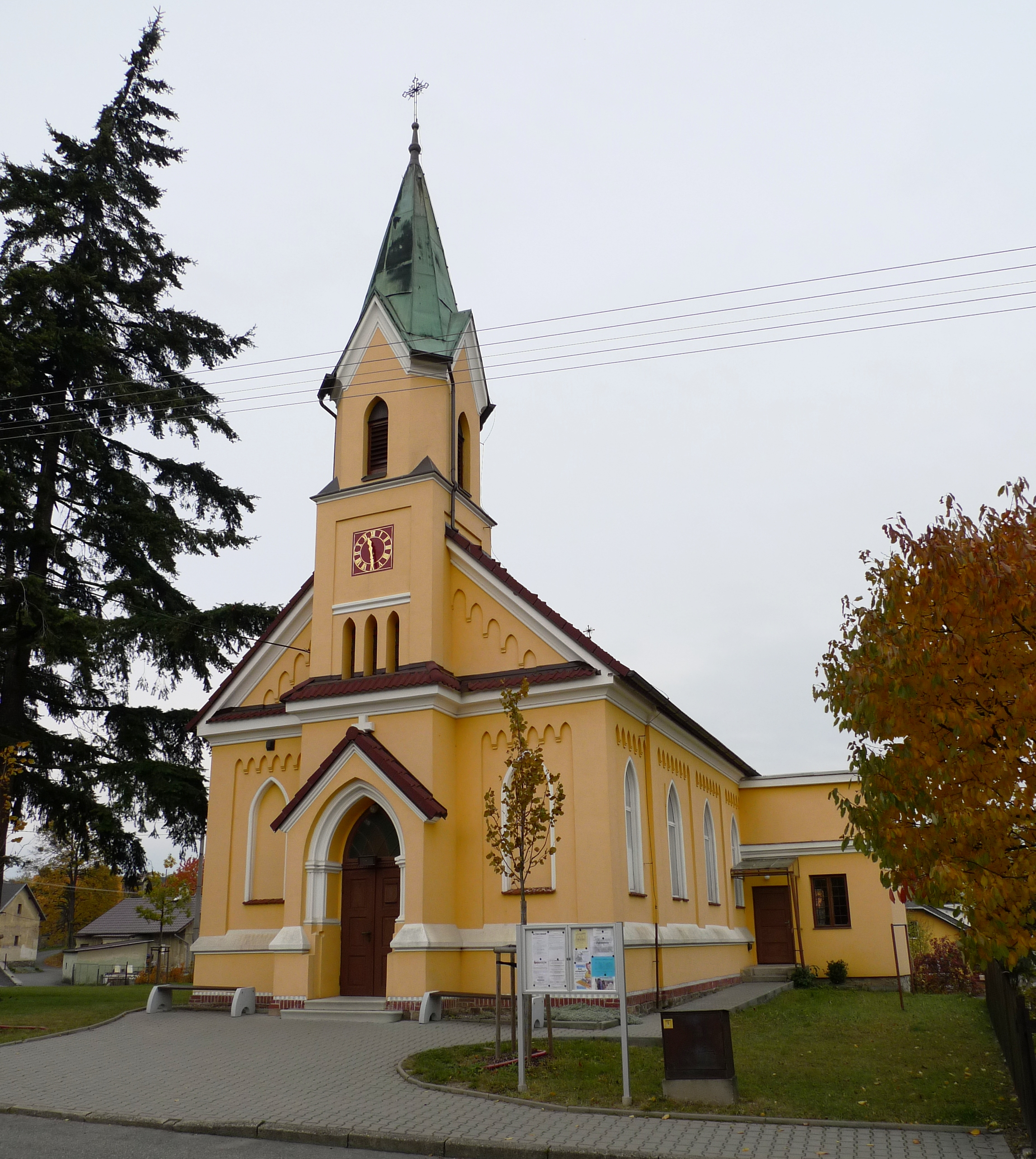 Kyjovice, kostel